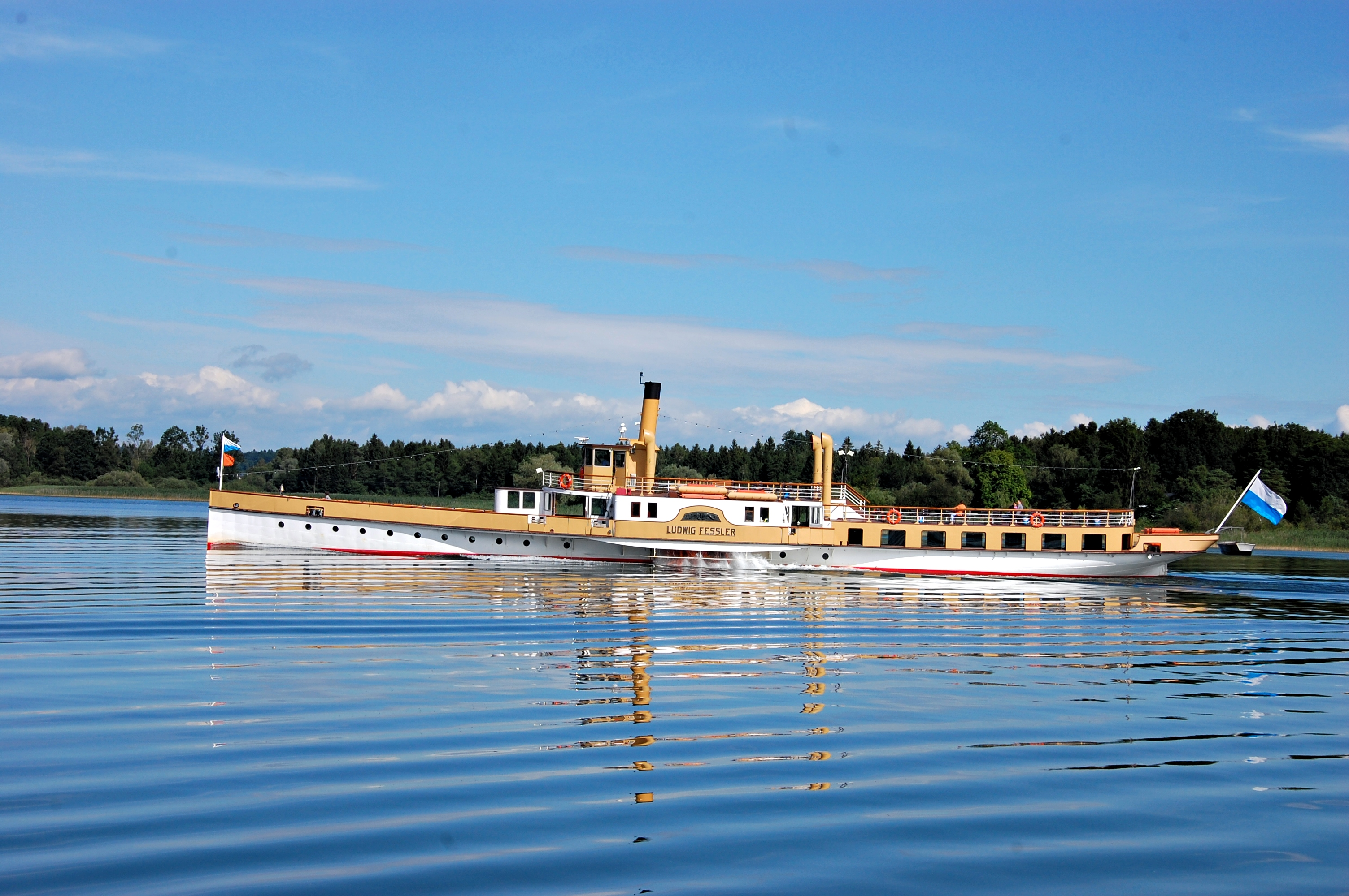 Ludwig Fessler in Fahrt komplett von der Seite